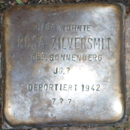 Stolperstein in Soest Grandweg 15 Rosa Zilversmit